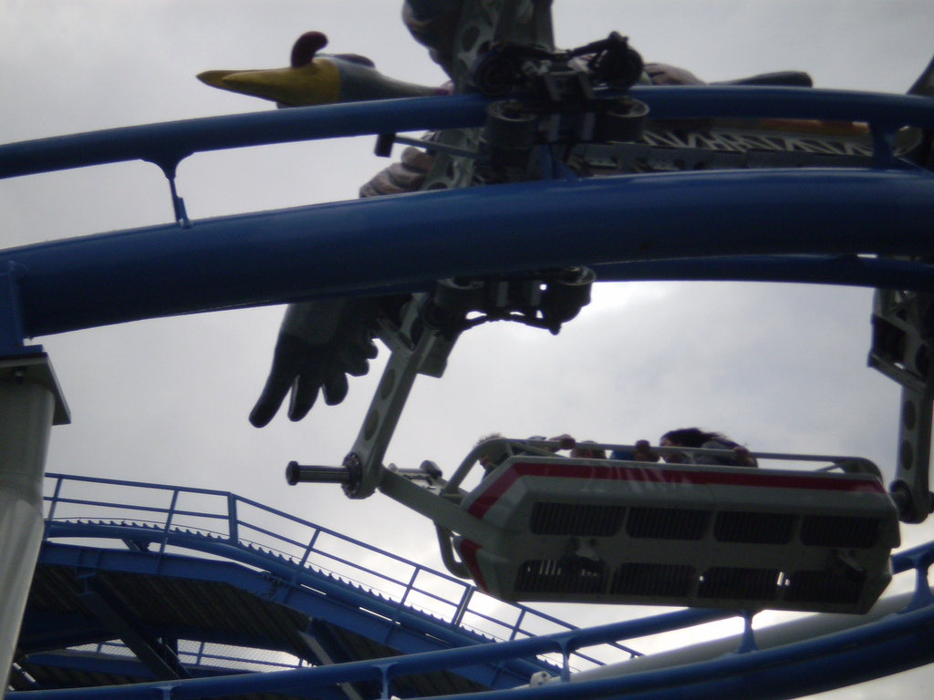 at Skara Sommarland